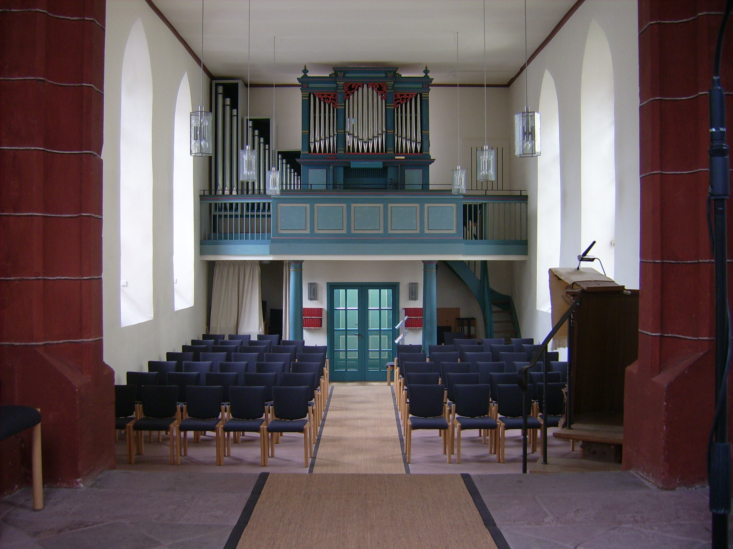 Böttner-Orgel der evangelischen Hospitalkirche zu Biedenkopf, Hauptwerksprospekt historisch von Adam Eifert aus dem Jahr 1904, für die Schlosskapelle zu Breidenstein erbaut.